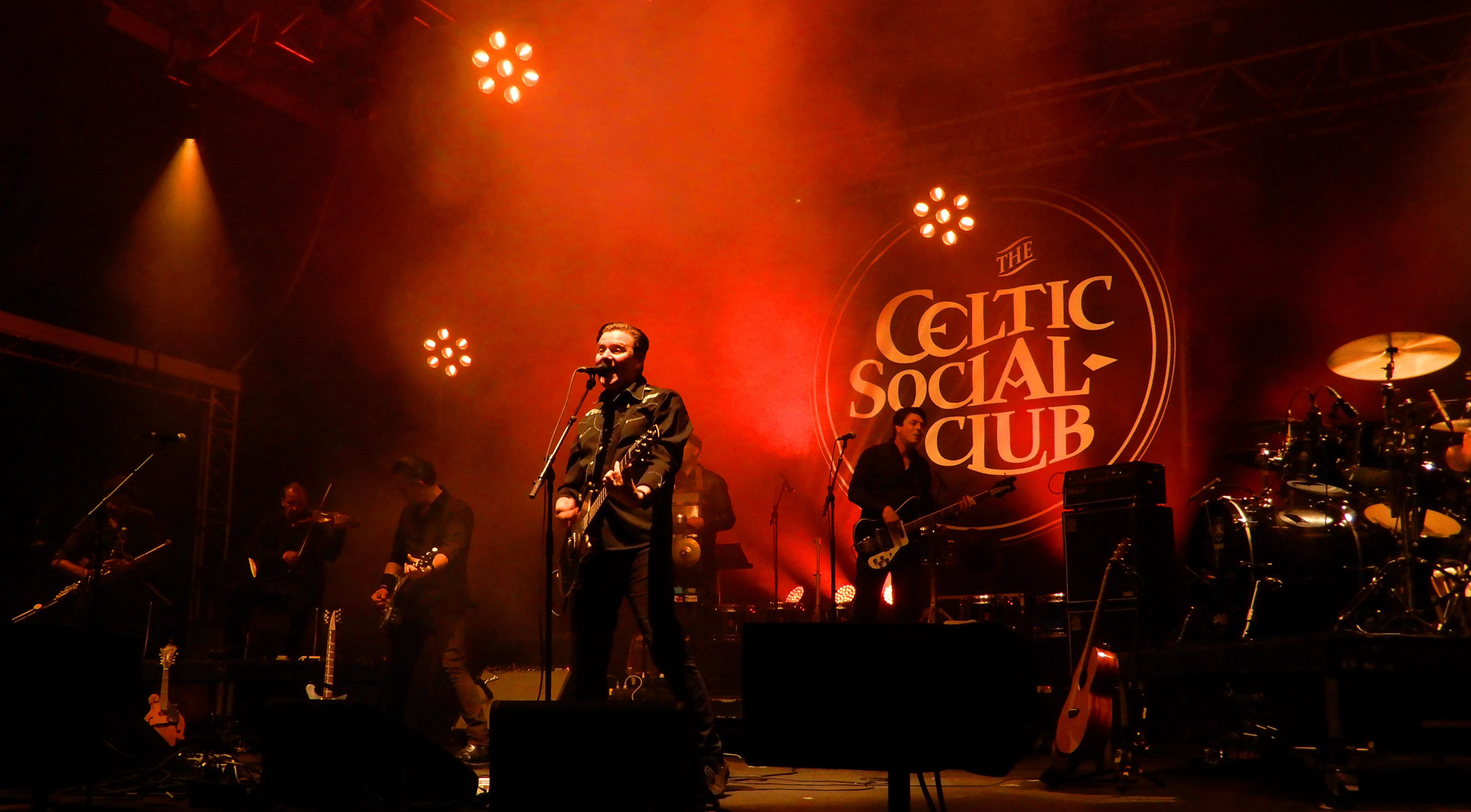 The Celtic Social Club Guingamp